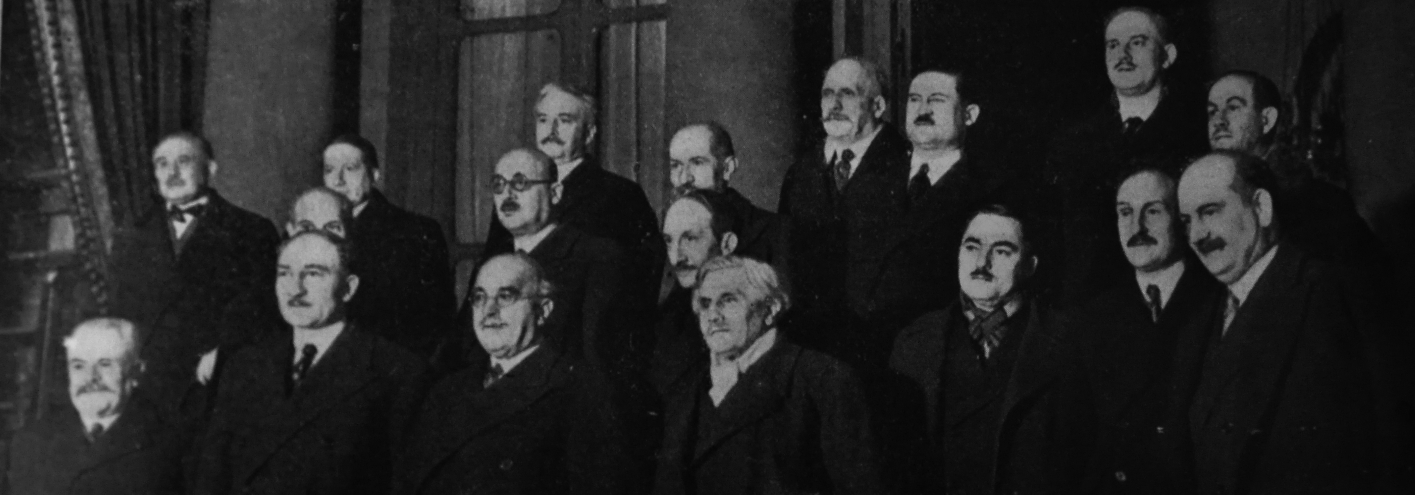 Le nouveau ministère que vient de constituer M. Sarraut est le centième depuis la chute de l'Empire. De gauche à droite, au premier rang: MM. Marcel Régnier (Finances); Yvon Delbos (Justice); Sarraut, (président du conseil et intérieur); Paul-Boncour (Ministre d'état, délégué aux affaires étrangères); Marcel Déat (Ministre de l'Air); Camille Chautemps (travaux publics); Pierre-Etienne Flandin (Affaires étrangères). Au 2e rang, derrière Monsieur Delbos et en partie caché, M. François Piétri (Marine); M. Frossard (Travail); M. Georges Bonnet (Commerce). Au 3e rang, MM. Besse (Pensions); Georges Mandel (P.T.T.)); M. de Chapdelaine (Marine Marchande); derrière M. Frossard, M. Henri Guernut (Instruction Publique); derrière M. Bonnet, le général Maurin (Guerre); MM. Louis Nicolle (Santé Publique); Paul Tellier (Agriculture);Jacques Stern (Colonies).